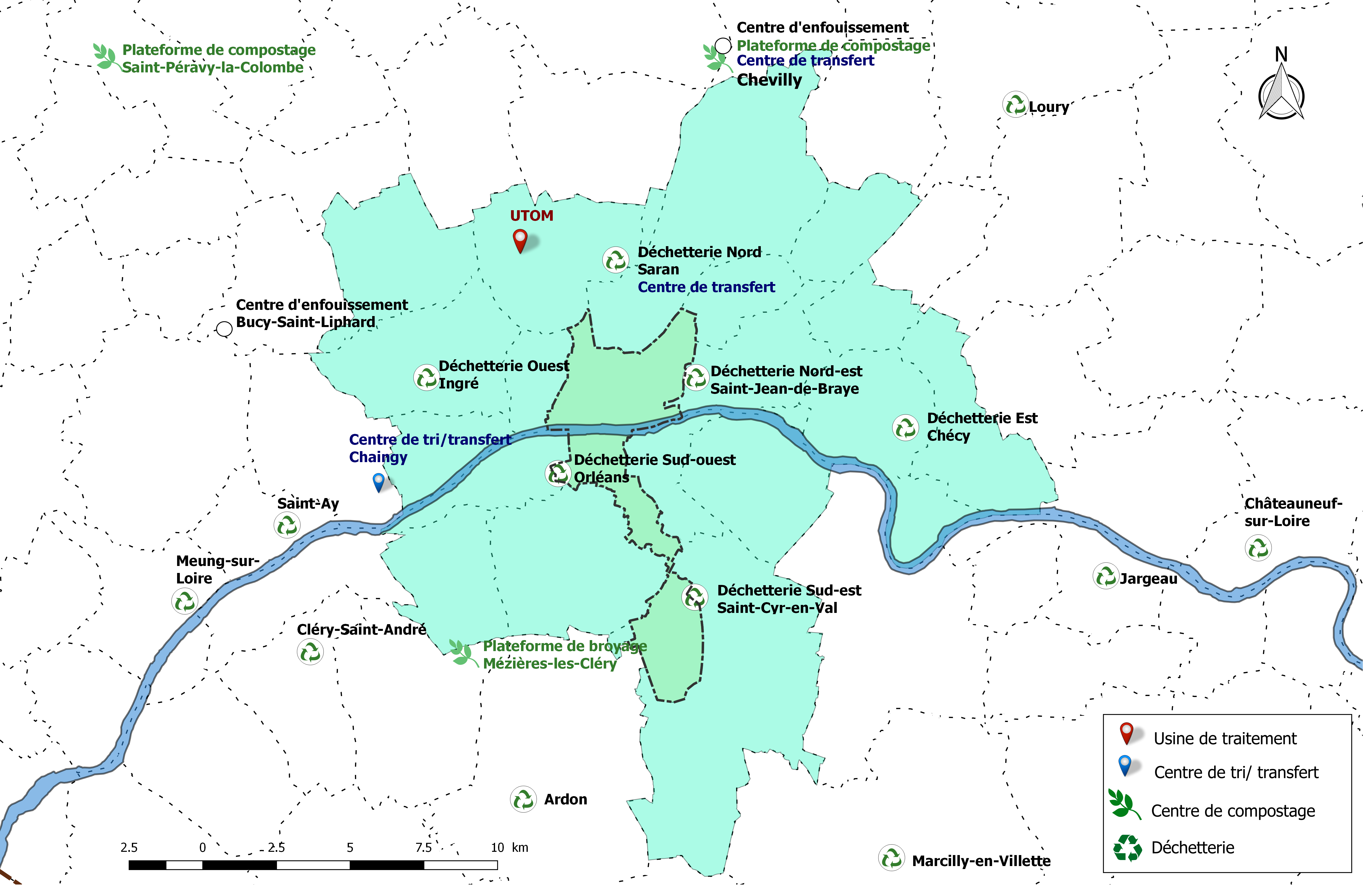 Sites de collecte, de traitement et de valorisation des déchets de la communauté urbaine d'Orléans Métropole, avec localisation de la commune d'Orléans.